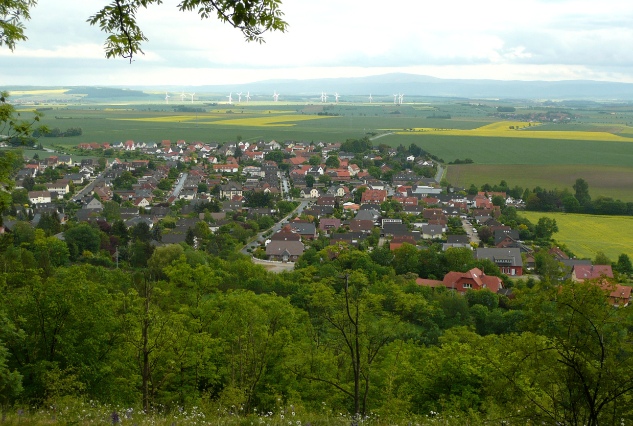 Wittmar mit Brocken von der Asse vom Bismarkturm